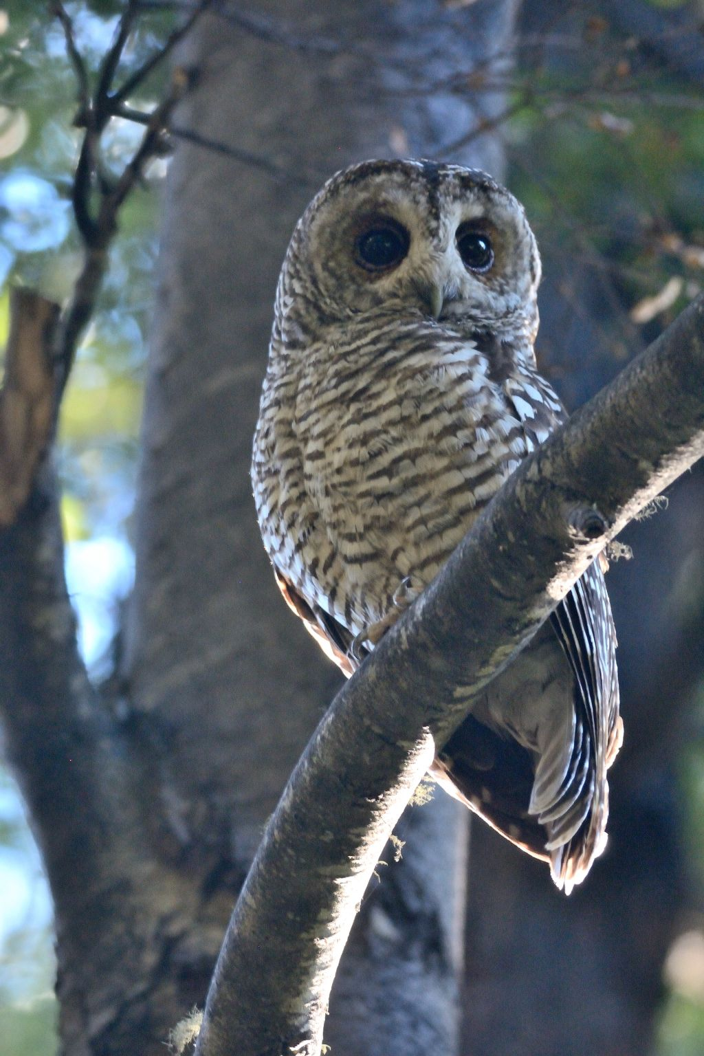 Concón, Valle las Trancas, 01ene17